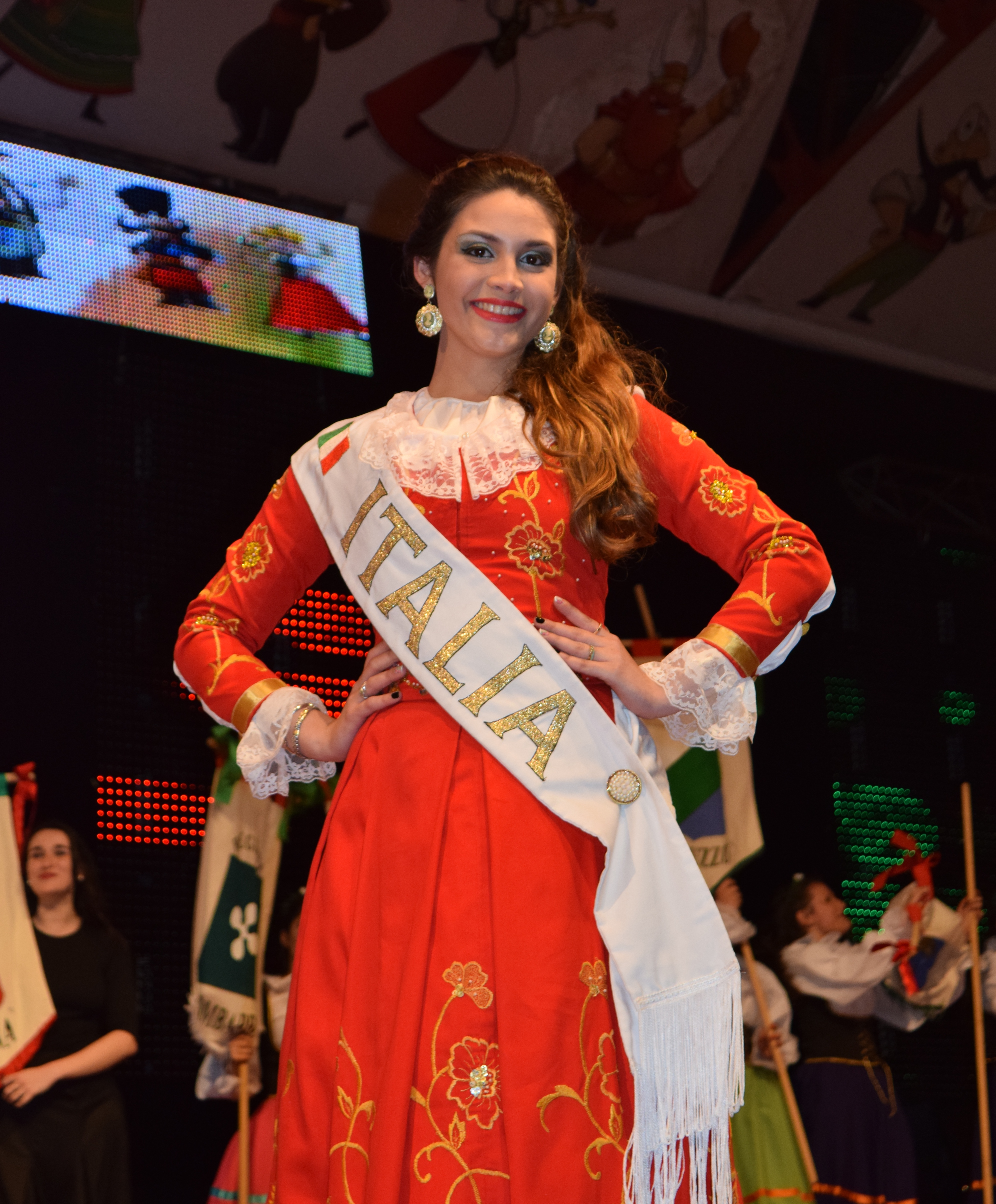 Andrea Gabriela García Gava, reina de la colectividad italiana, durante la XXXV Fiesta Nacional del Inmigrante en Oberá, Misiones, Argentina.